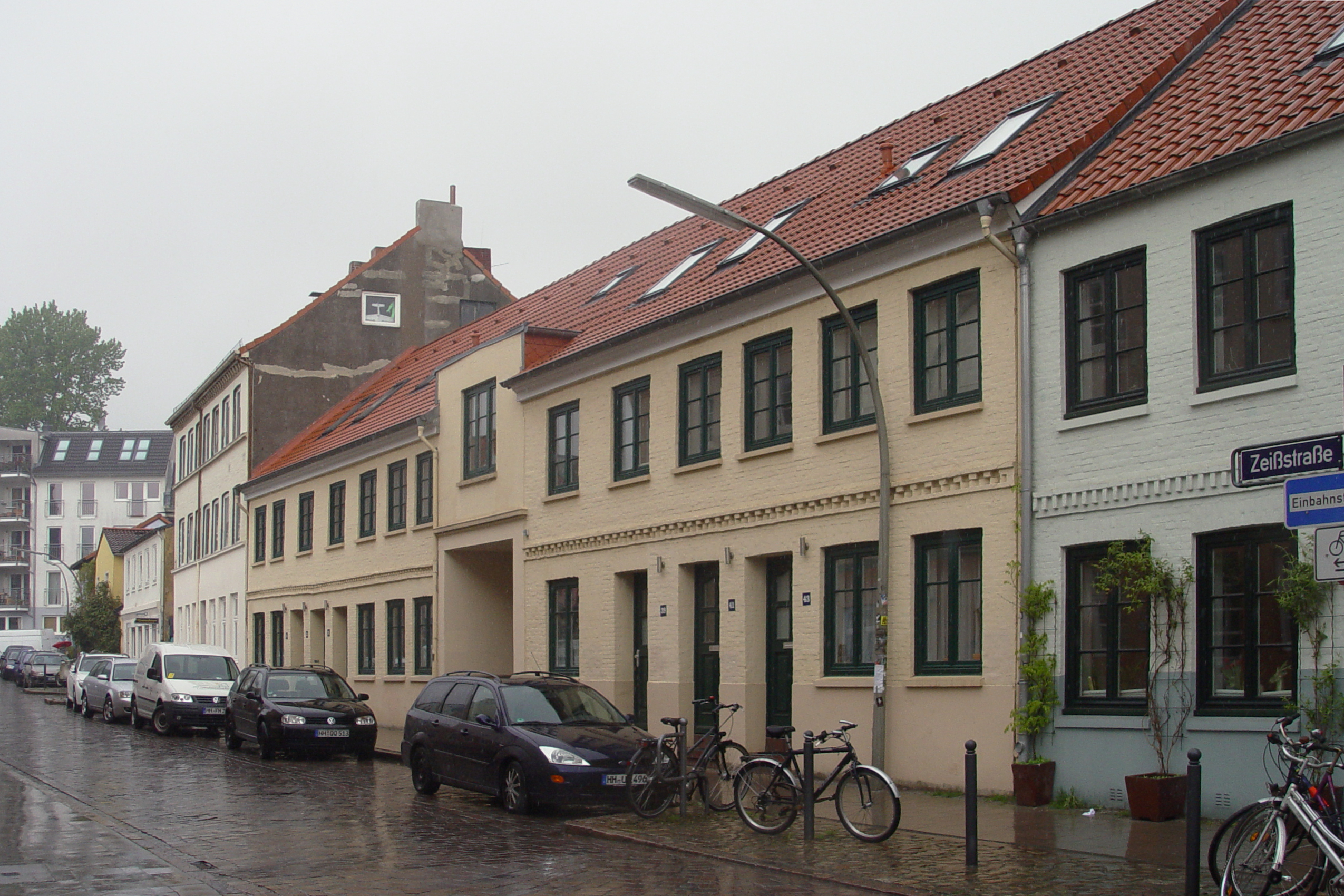 Hamburg, Bezirk Altona, Stadtteil Ottensen. An die dänische Vergangenheit Altonas erinnern die denkmalgeschützten Gebäude Zeißstraße 39, 41 und 43 aus dem Jahre 1864 (Torwegüberbauung 1903), Denkmalnr. 15059 (alt 1104), Teile des Ensembles 30224This is a photograph of an architectural monument.